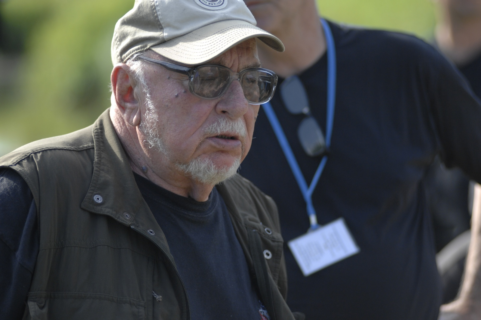 Jerzy Hoffman